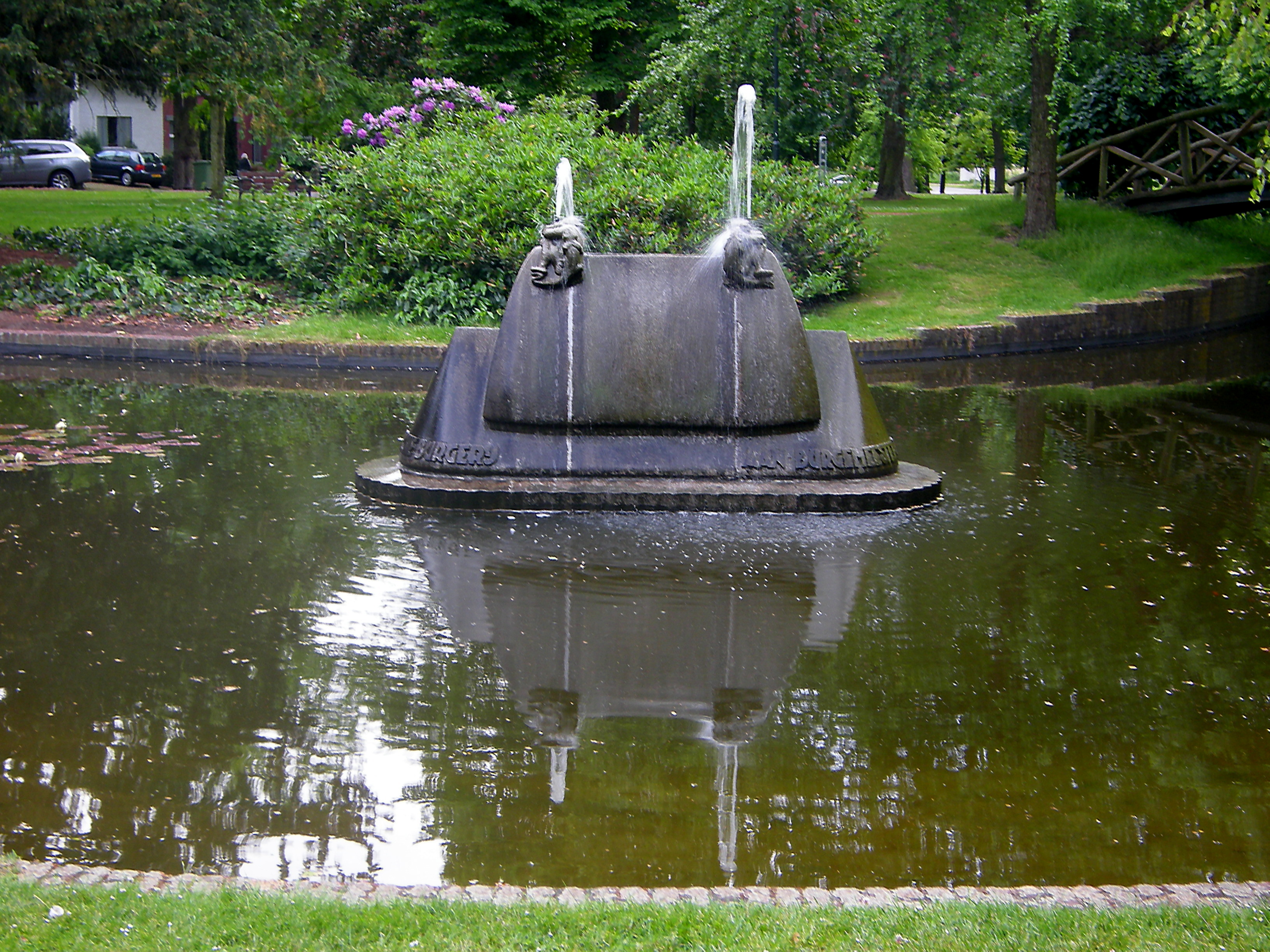 Fountain